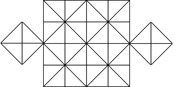 虎棋棋盤的一種。